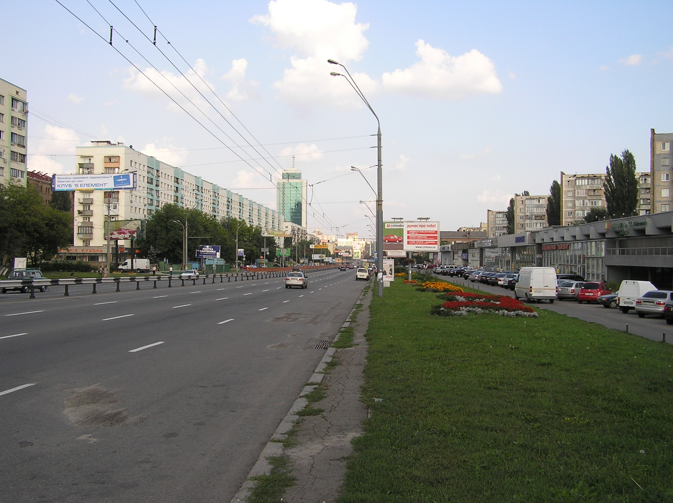 Kiew. Prospekt Pobedy Киев. Проспект Победы